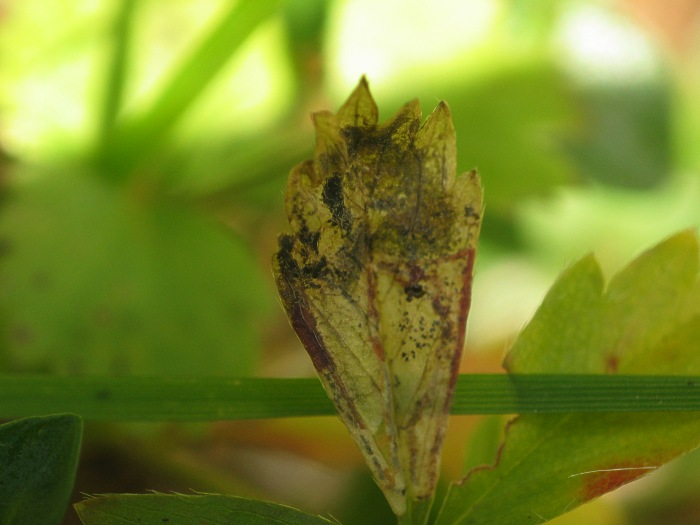 Mine von Stigmella aeneofasciella